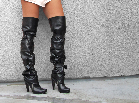 Женские ботфорты